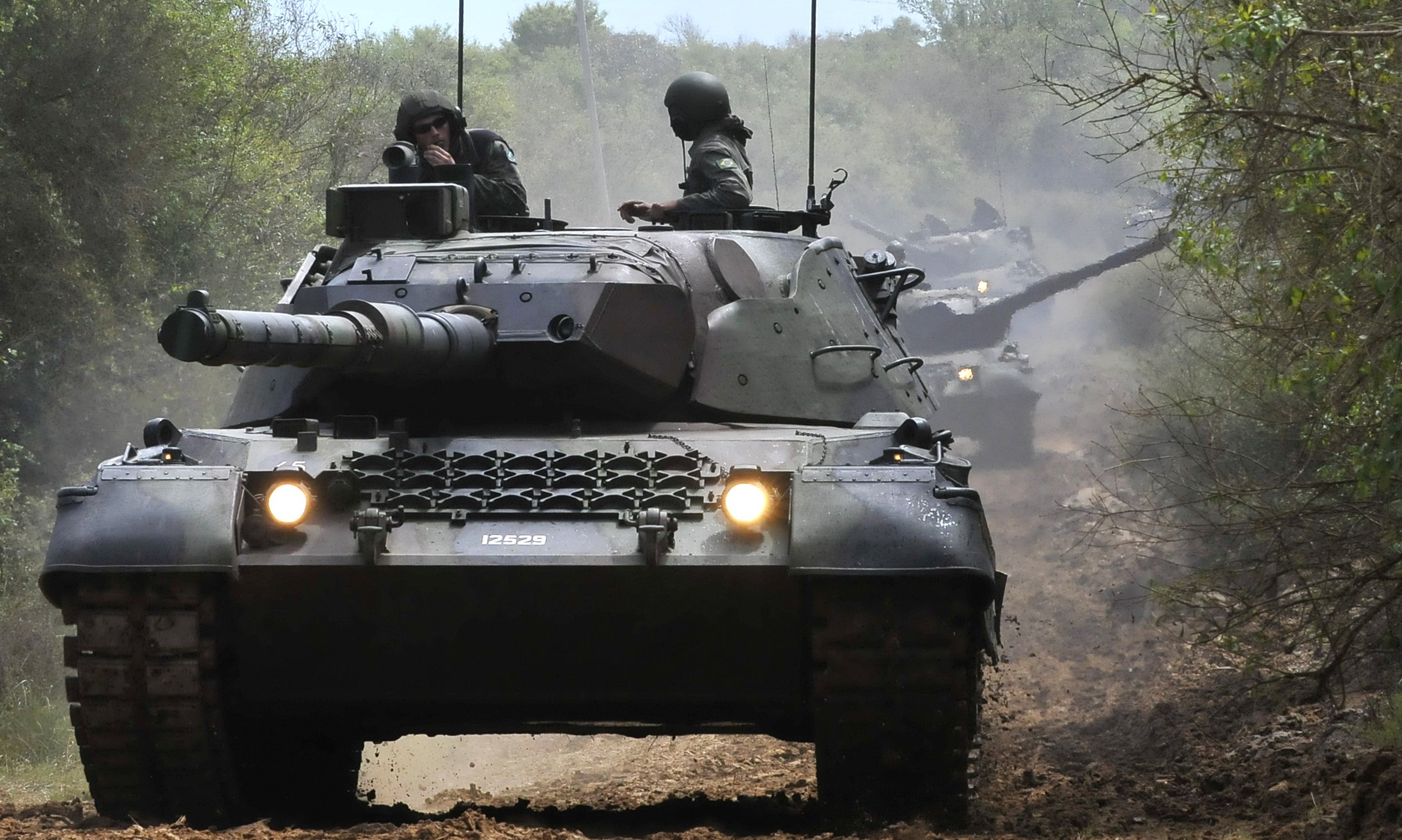 Fotos: Jorge Cardoso